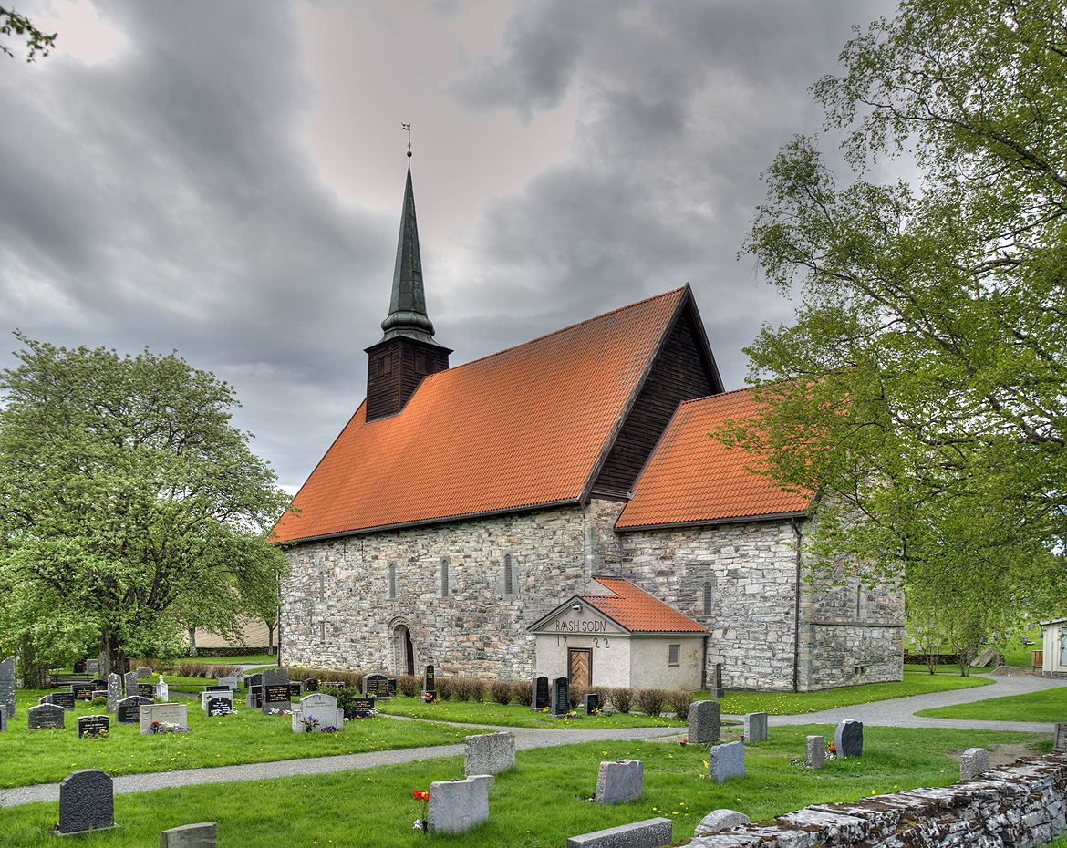 Stiklestad kirke